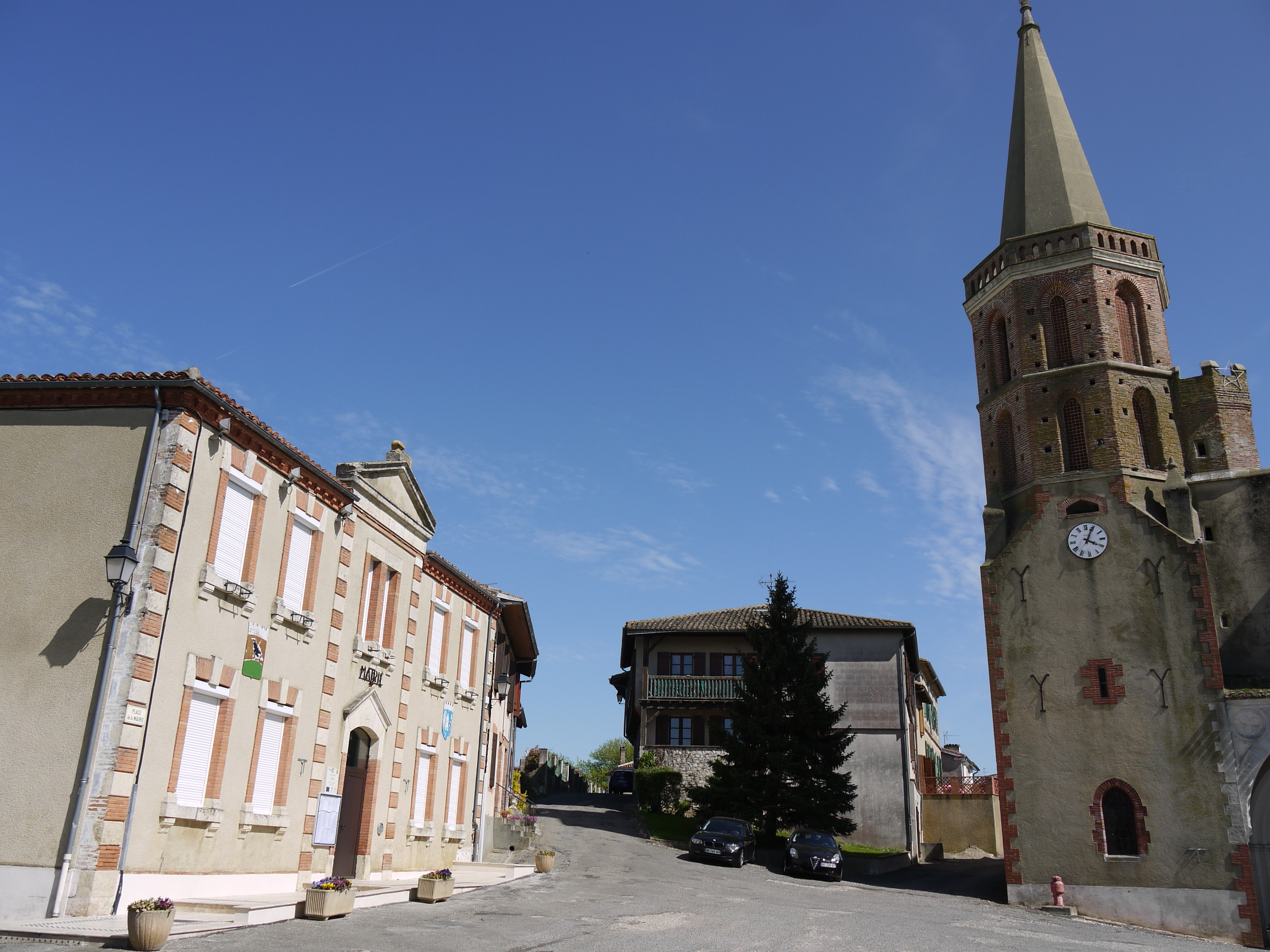 La Place de la Mairie, avec la mairie à gauche et l'église à droite, à Aubiet